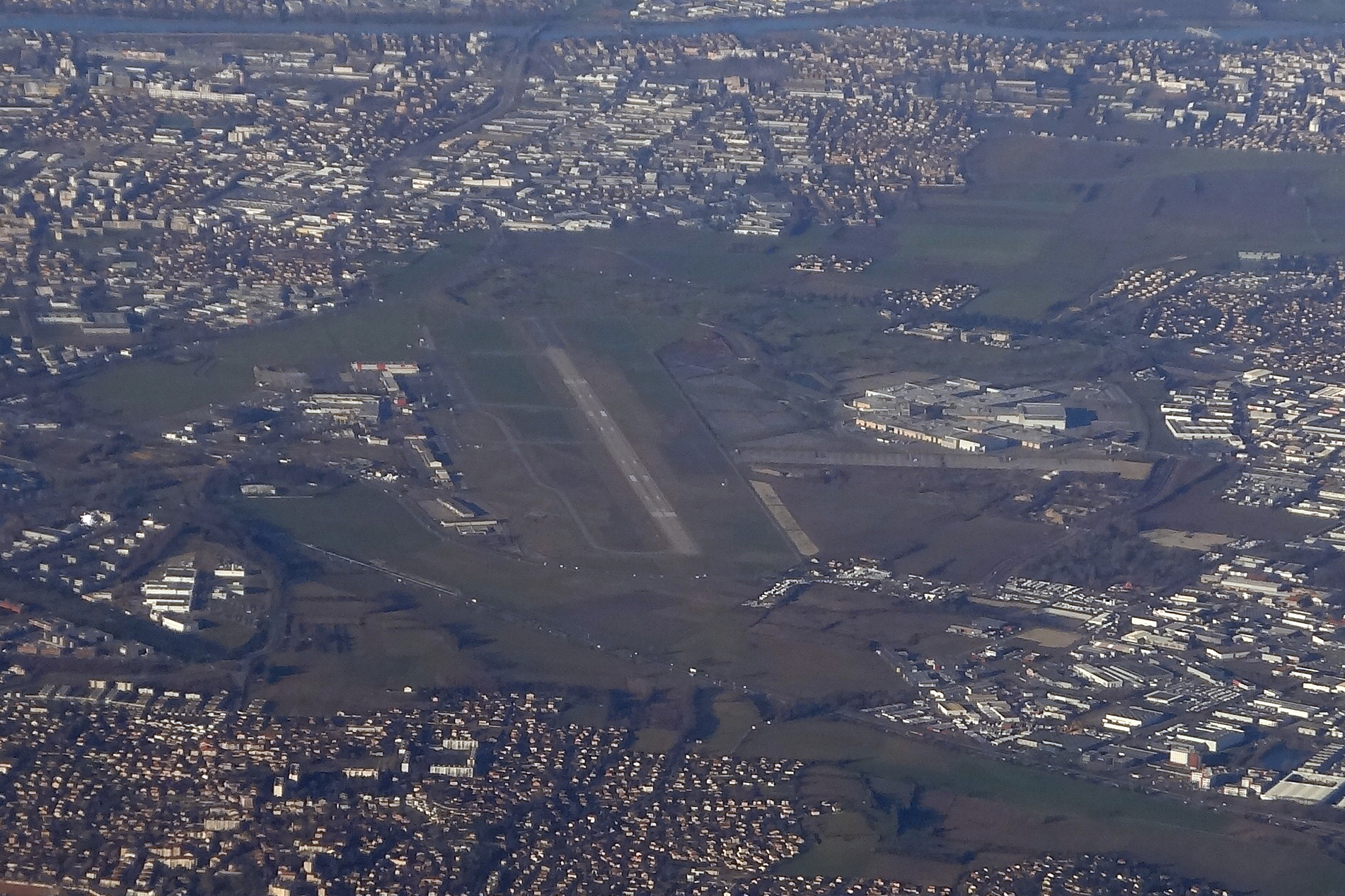 LYN AIRPORT LYON-BRON FROM FLIGHT A319 EASYJET LYS-BOD G-EZNC